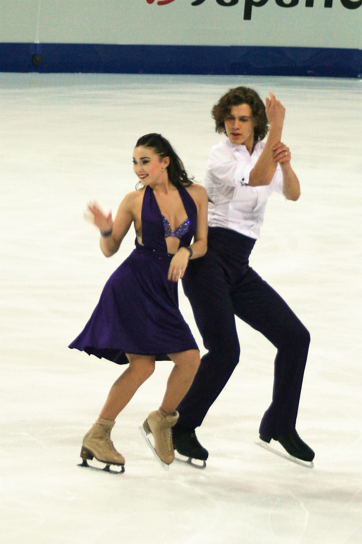 Алла Лобода / Павел Дрозд (Россия) на финале Гран-при по фигурному катанию среди юниоров 2016-2017